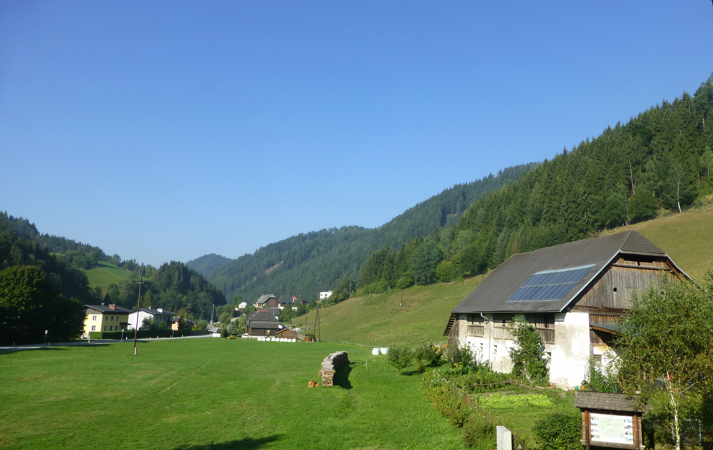 Breitenau am Hochlantsch, Ortsteil StJakob, Steiermark.